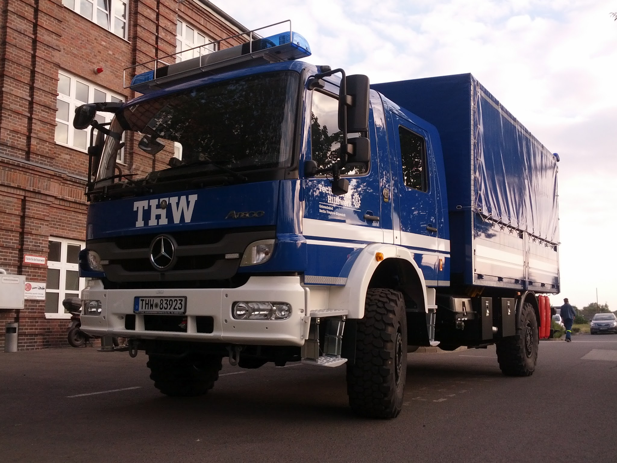 MLW IV der Fachgruppe Wasserschaden-Pumpen des THW Treptow-Köpenick